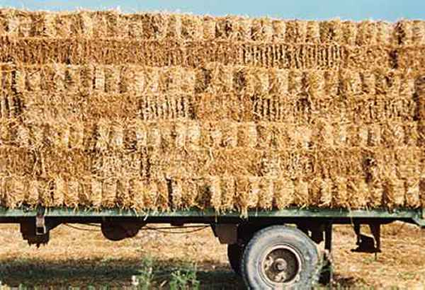 Categorie:Vervoermiddel Categorie:Landbouwwerktuig